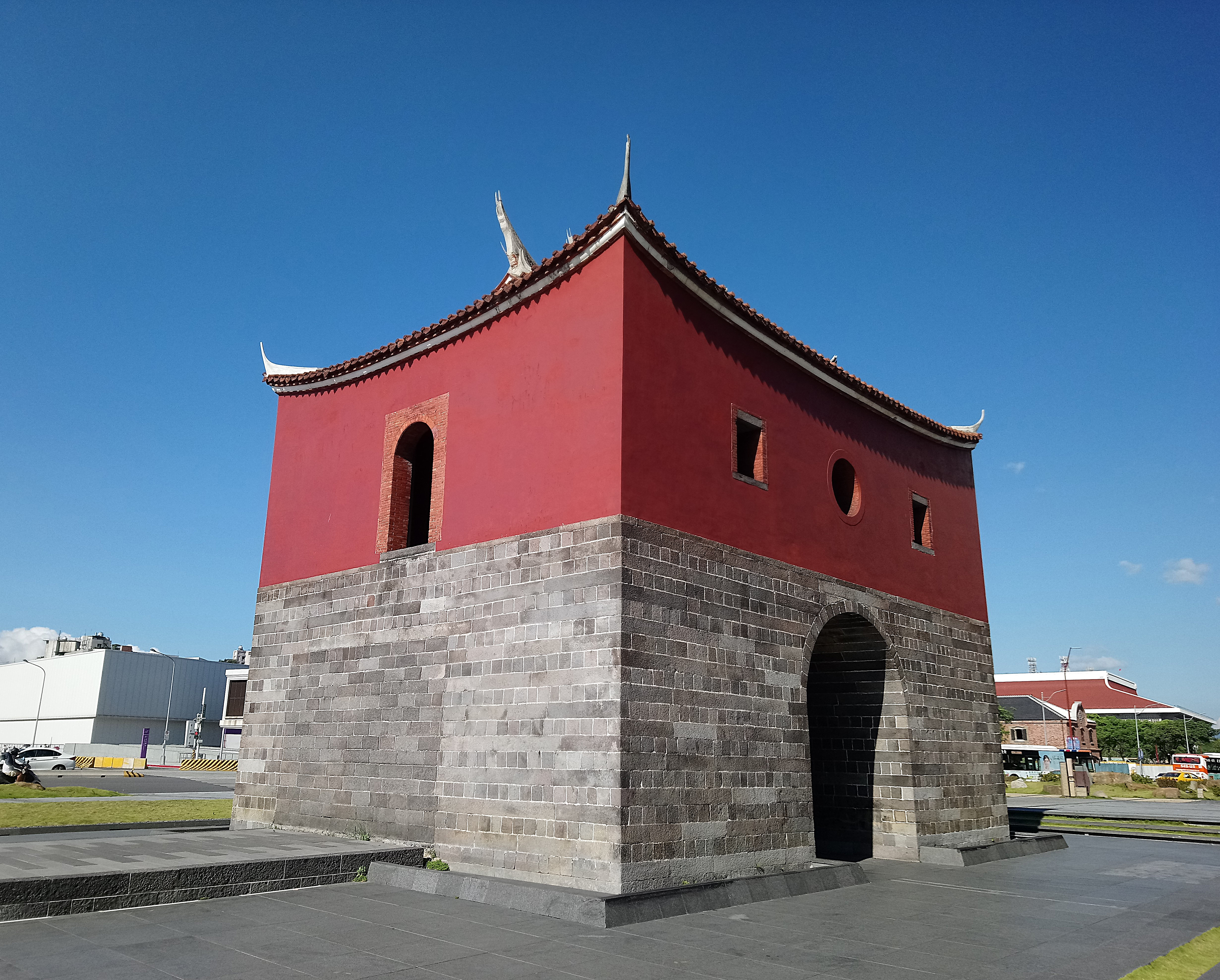 北門廣場完工後的臺北府城北門